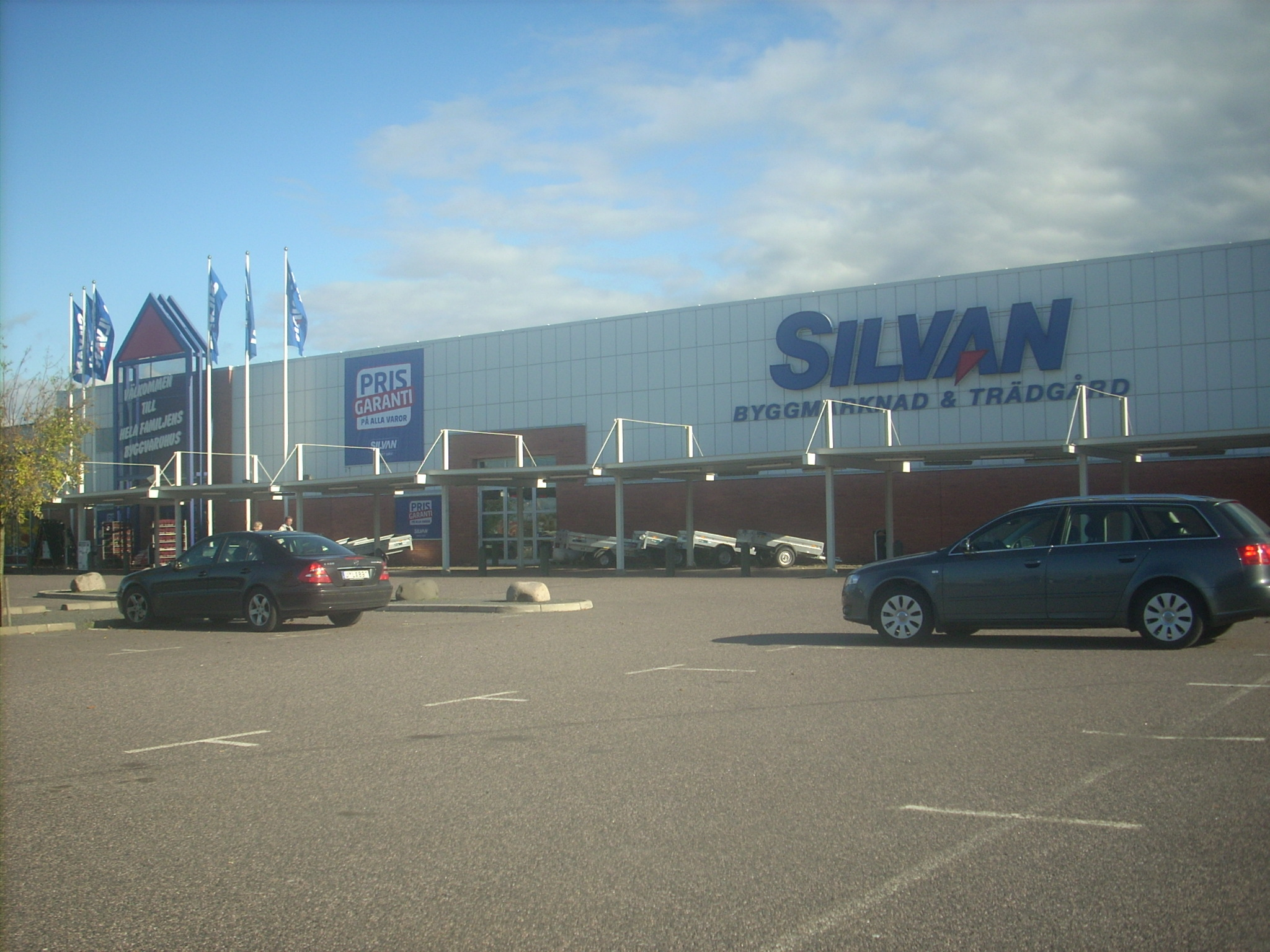 SilvanBygg i Jönköping